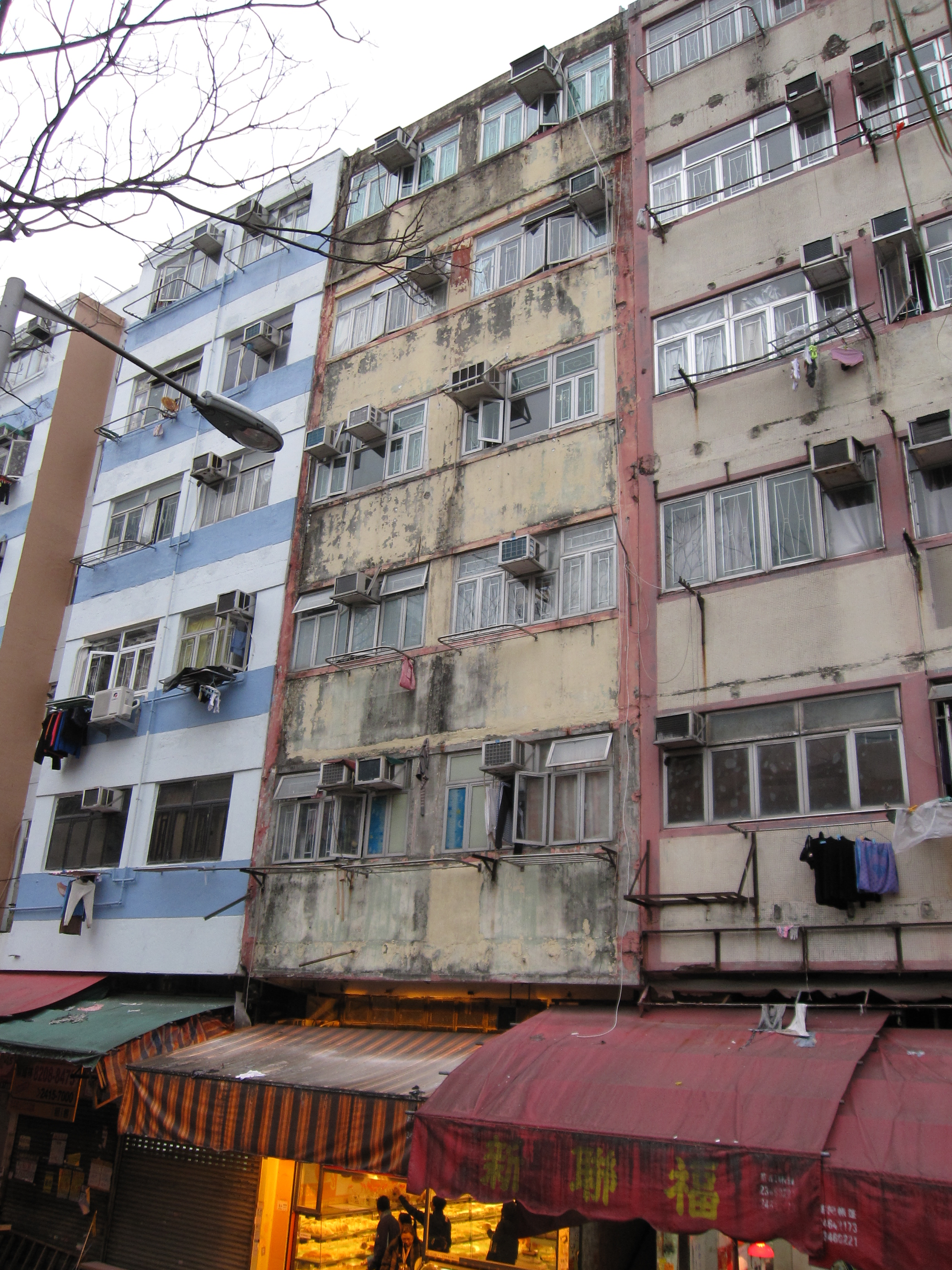 中文（香港）: 德仁樓第九期。